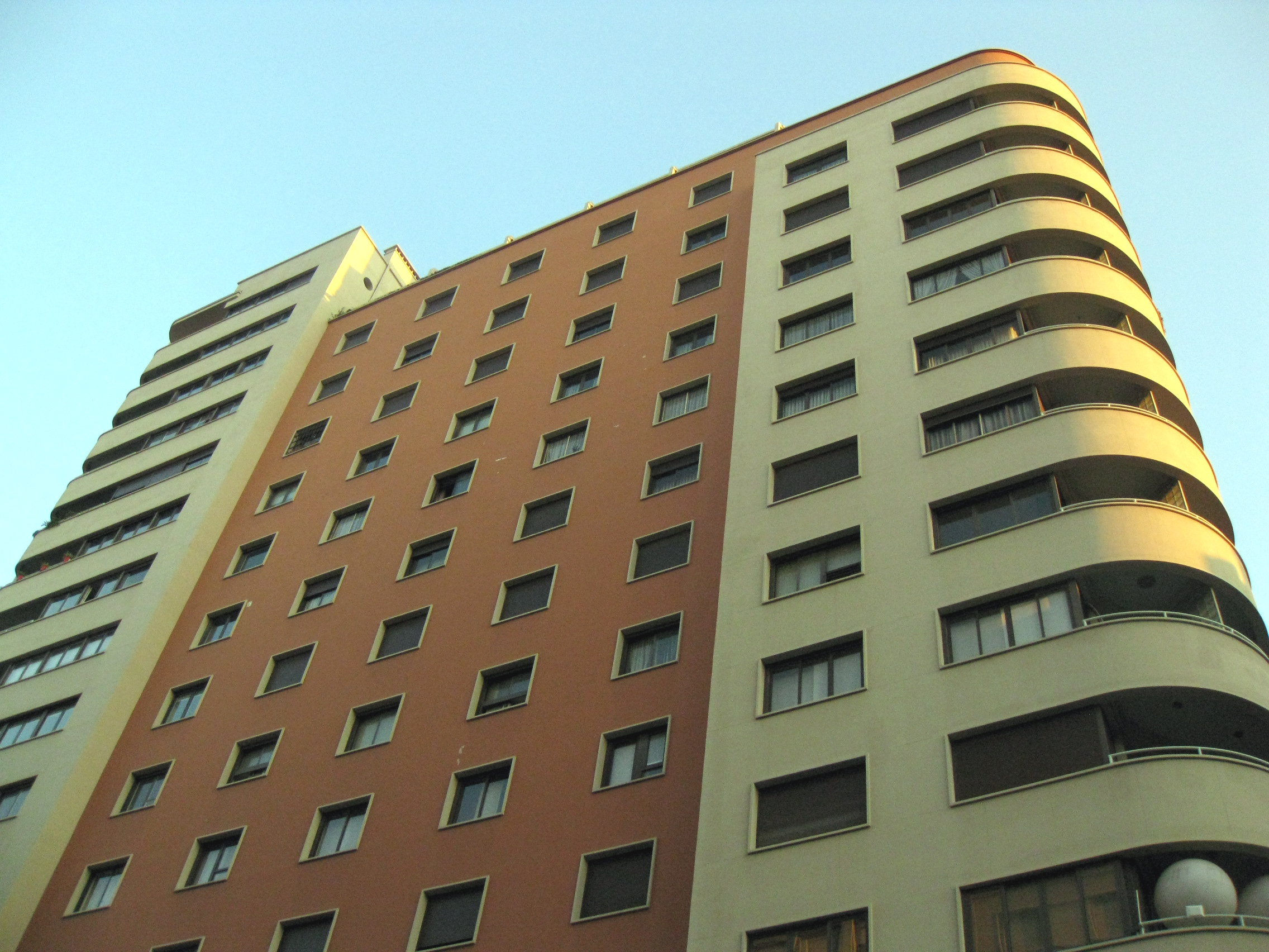 Edifici Fàbregas, conegut com el Gratacel Urquinaona per la seva posició a la plaça d'Urquinaona, a la cantonada entre els carrers Trafalgar i Jonqueres (Barcelona). Projectat per l'arquitecte Luis Gutiérrez Soto, fou construït entre 1936 i 1944; amb els seus 15 pisos d'alçada, fou el primer gratacel bastit a Barcelona. A la imatge, la façana del carrer de Trafalgar, núm. 2-4.